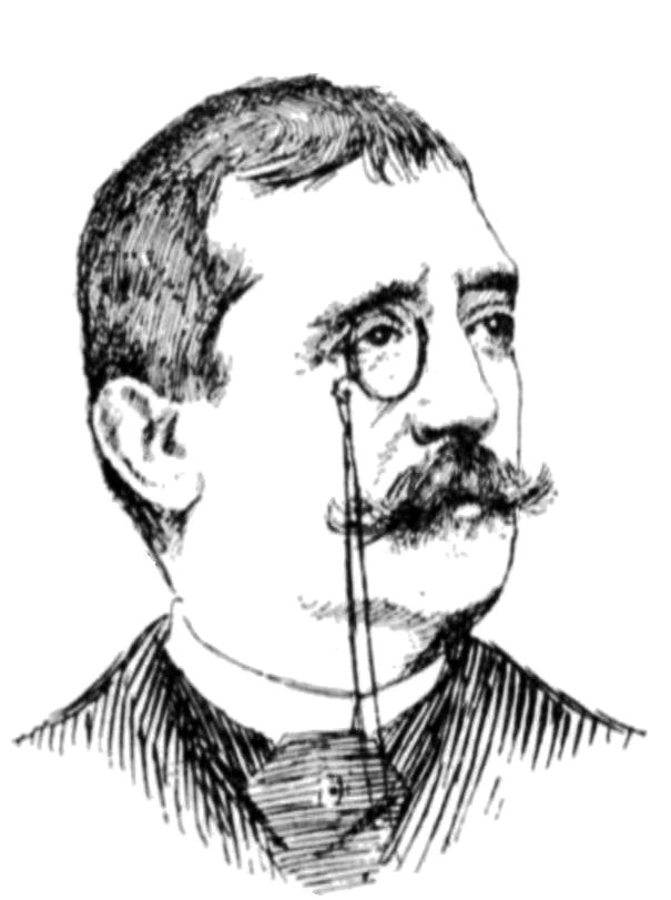 Abel Peyrouton, collaborateur de L’Écho de Paris.